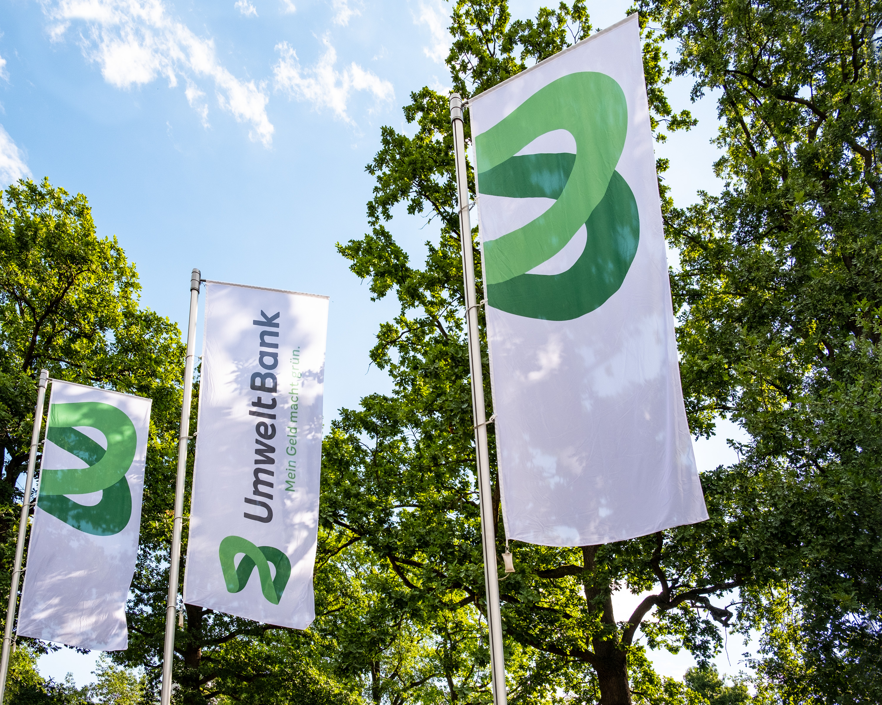 UmweltBank-Flaggen mit Logo (Jahr: 2018)